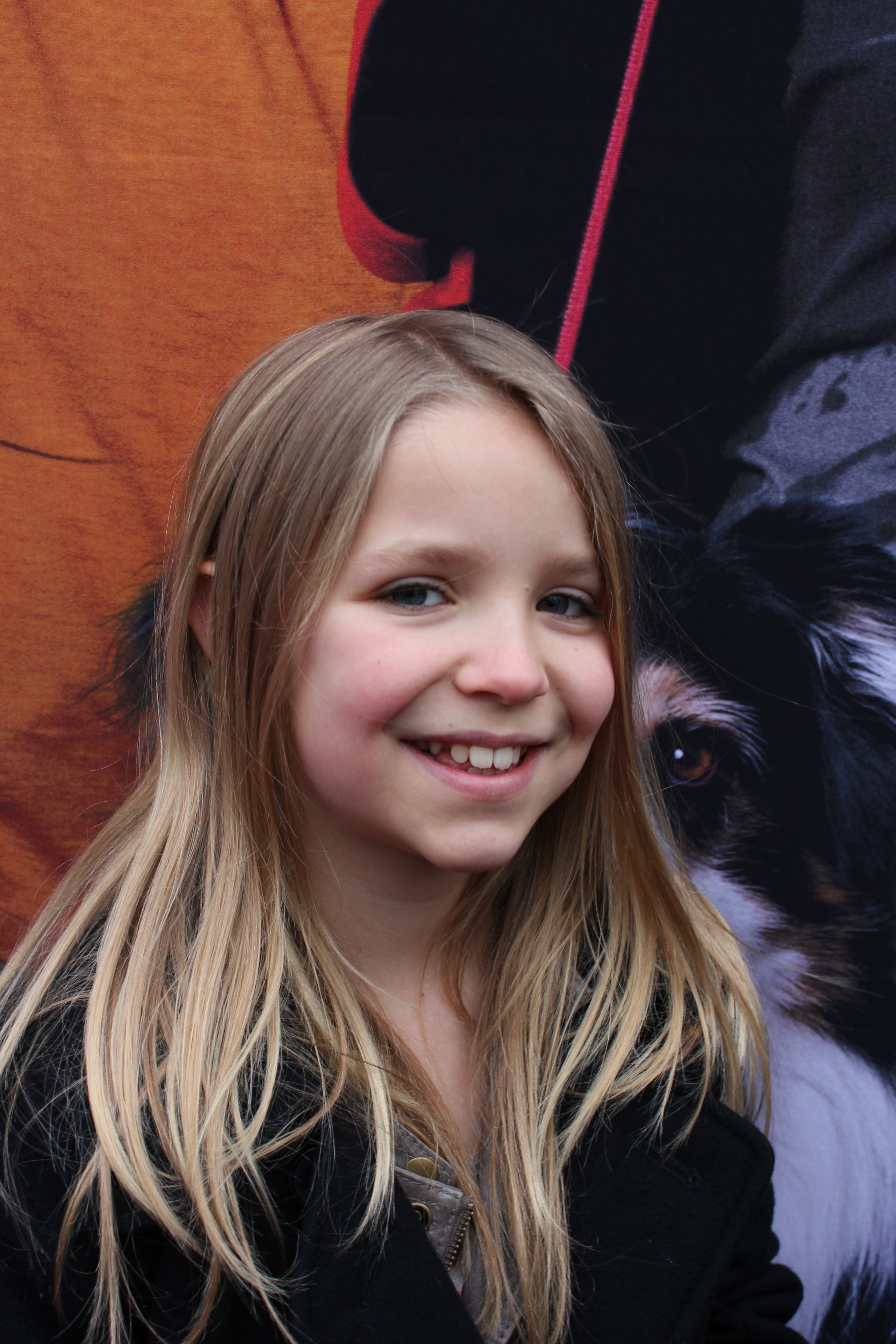 Portrait-Aufnahme von Neele Marie Nickel bei der Schleswigpremiere des Fünf Freunde Films (28. Januar 2012).